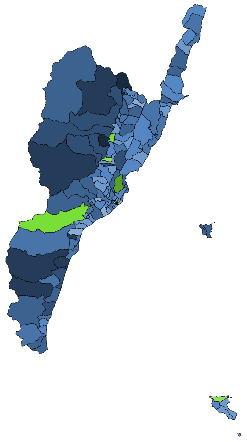 顏色對照表